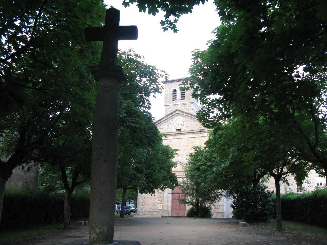 Eglise romane de Balbiac